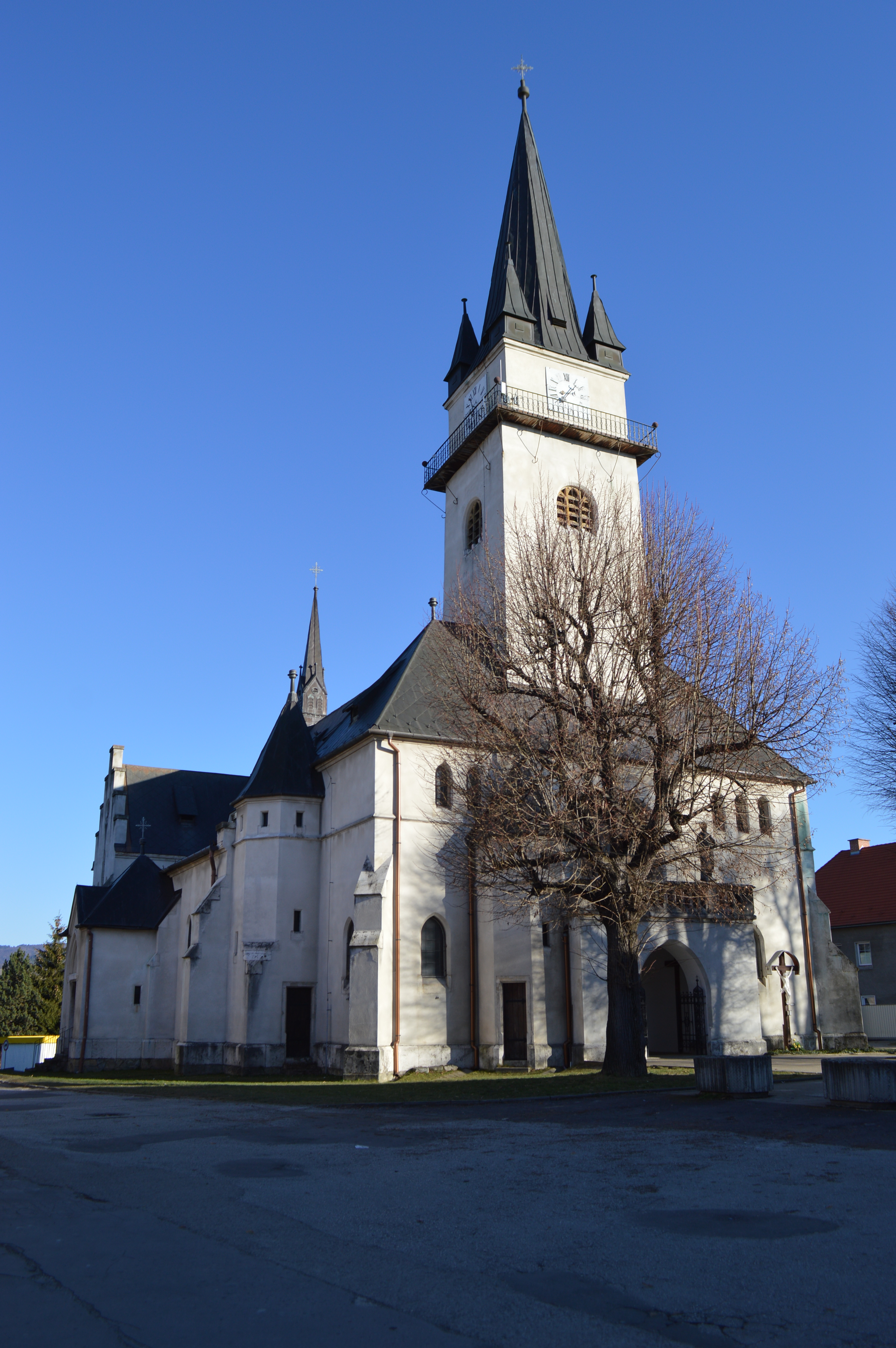 Kostol Sv. Jána Krstiteľa